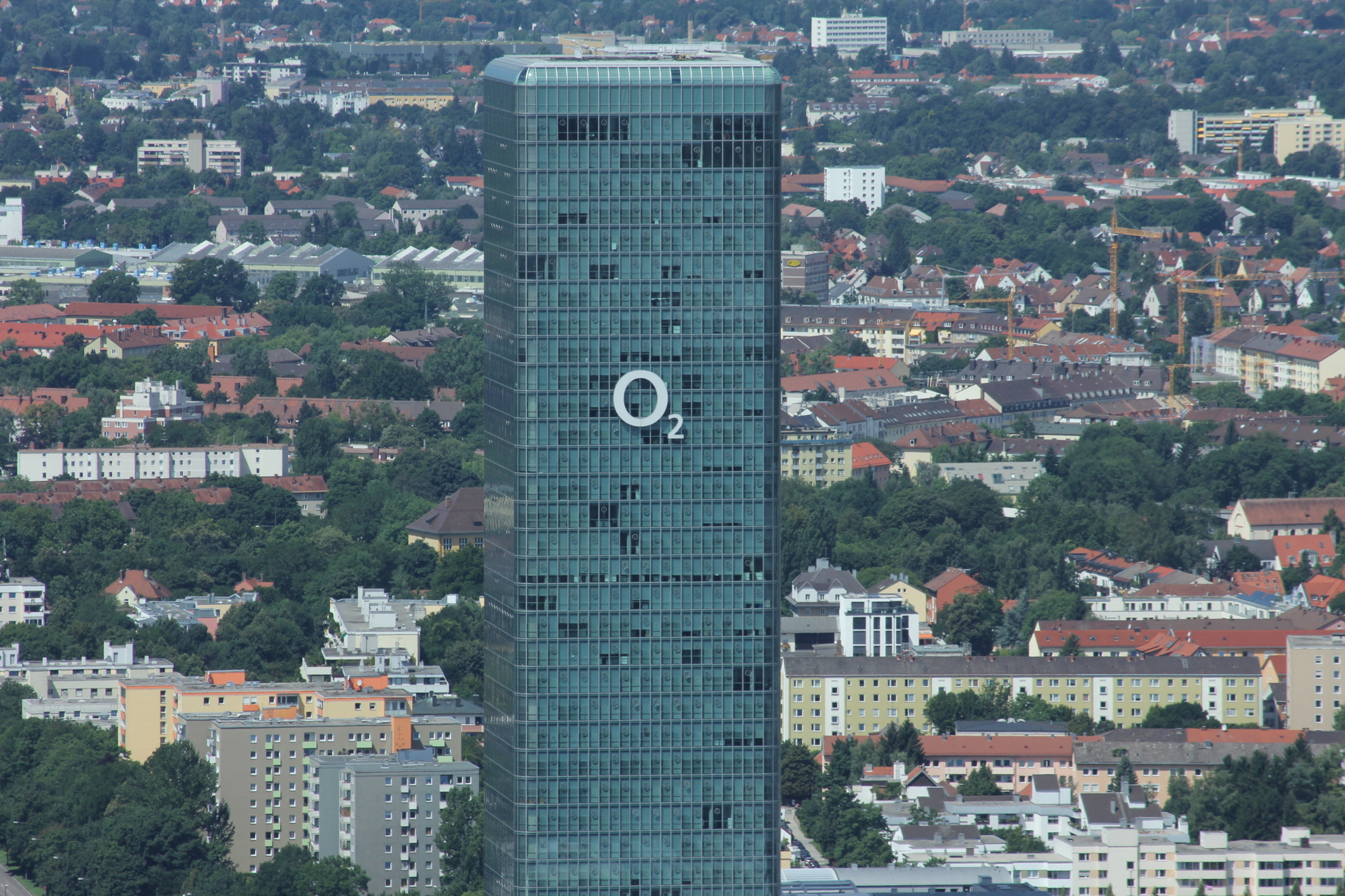 Wikipedia im Landtag – Bayern 17. bis 19. Juli 2012 in München Dieses Foto wurde im Rahmen des Projektes „Wikipedia im Landtag“ erstellt.